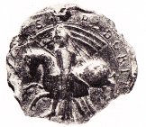 Siegel von Pfalzgraf Friedrich II. von Wittelsbach von 1116